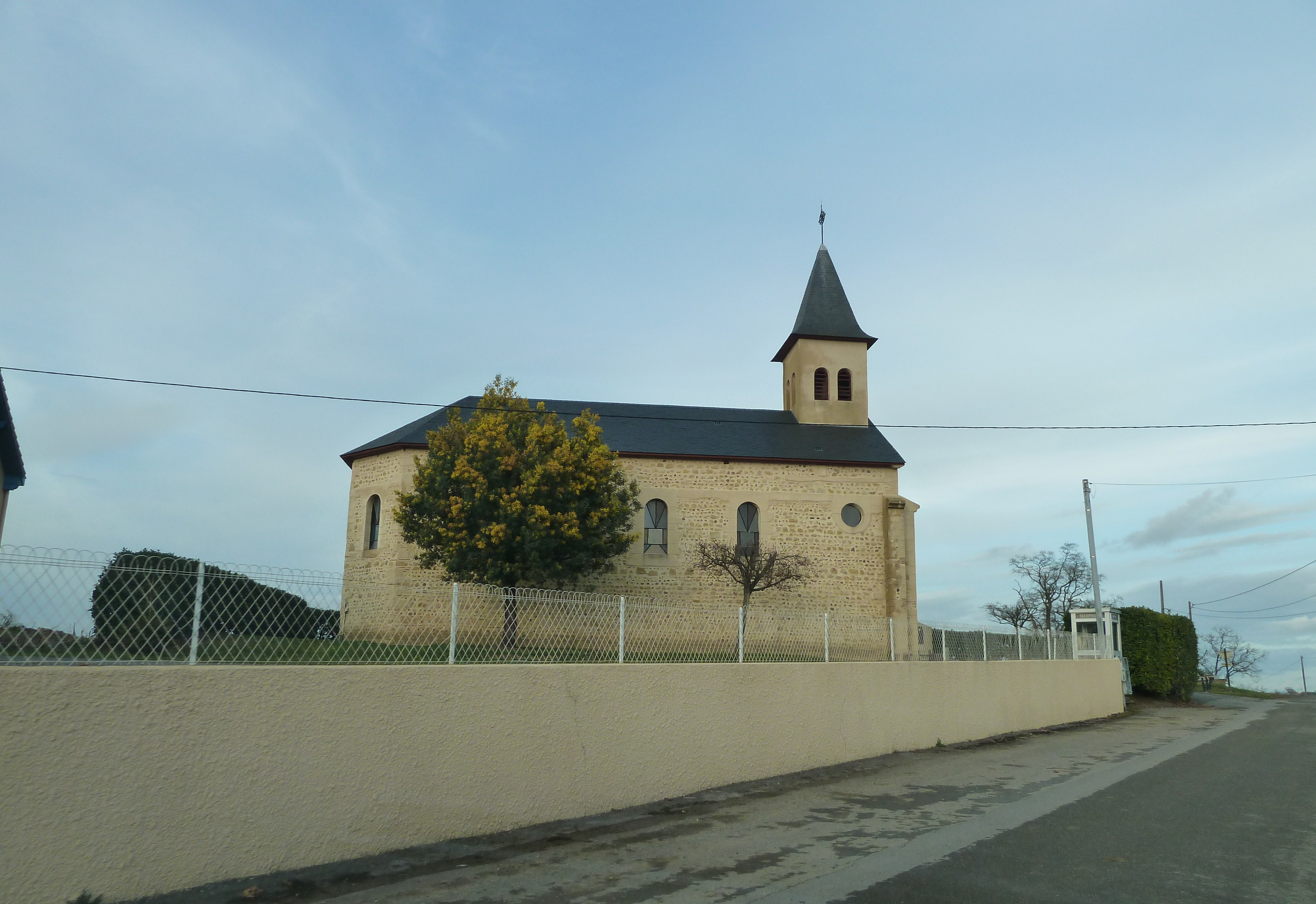 Eglise de Lonçon